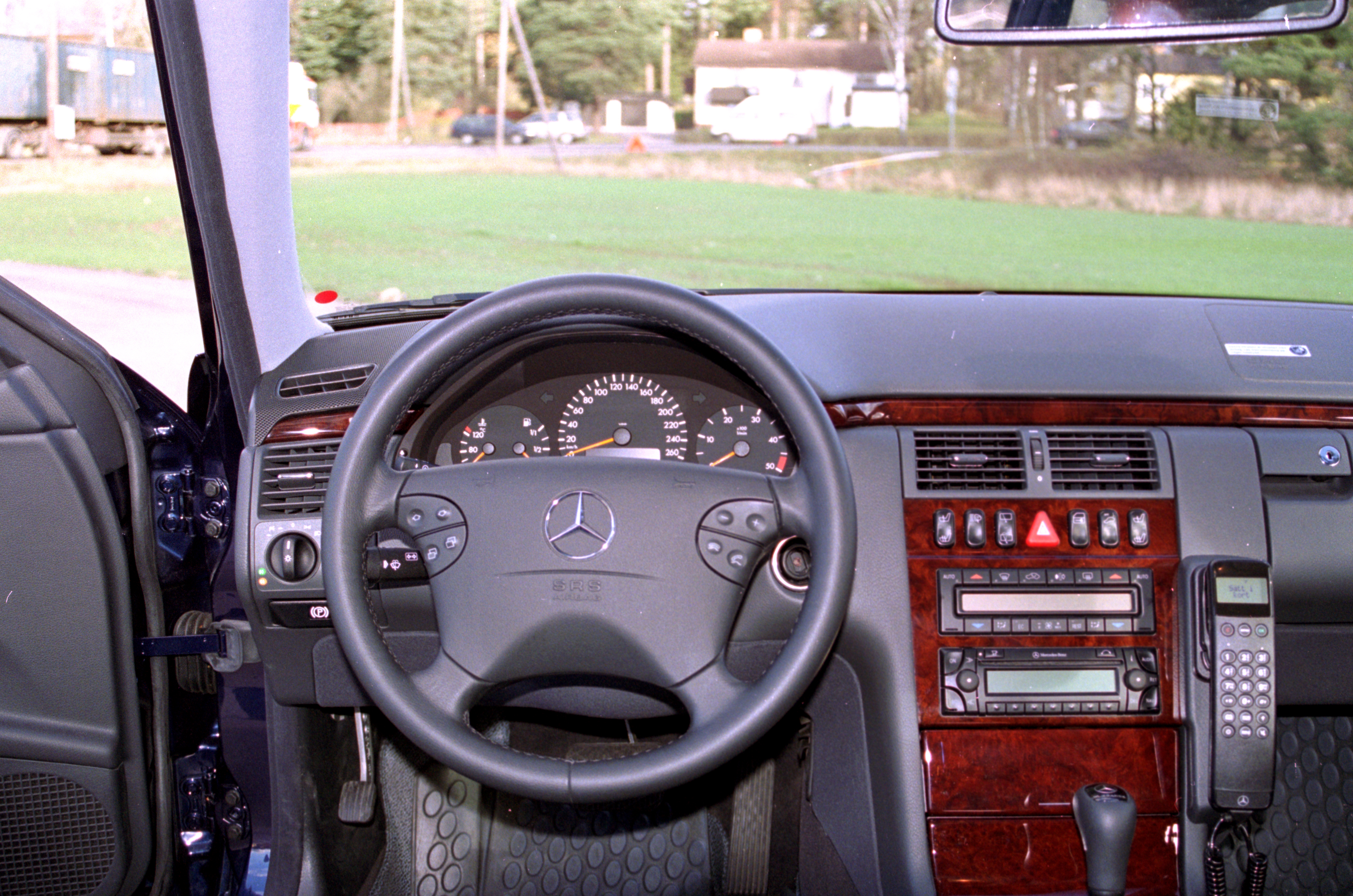 Mercedes-Benz W210, E270 TCDI, 170 hk. INstrumentpanel.